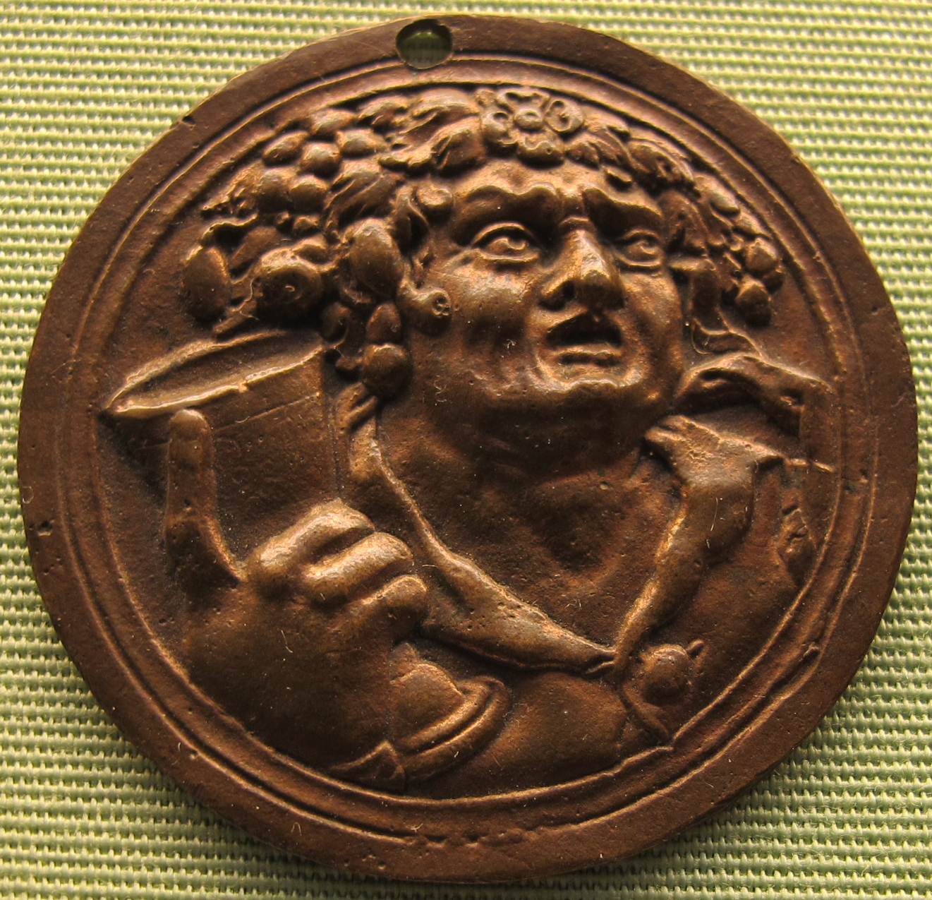 Paesi Bassi o Germania - ritratto di bevitore - 16mo sec